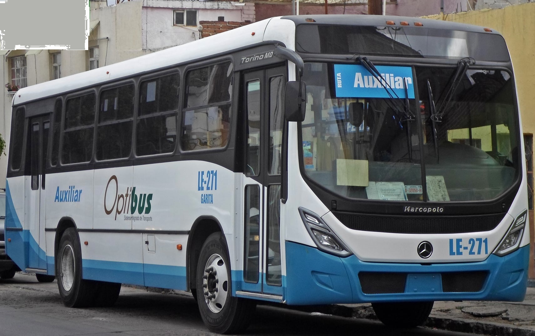 La línea Garita fue una de las dos empresa del grupo Corporativo Transporta que recibió más unidades Torino MD, las cuales operan mayormente en las rutas auxiliares X-02 y X-62